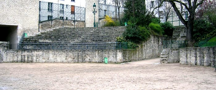 Arènes de Lutèce (Paris, France) gradins nord. Fin du Ier siècle.